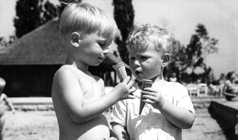 Illus-Brenner Berlin 1949; Im Strandbad - "Ist's schon alle?" 3239-49